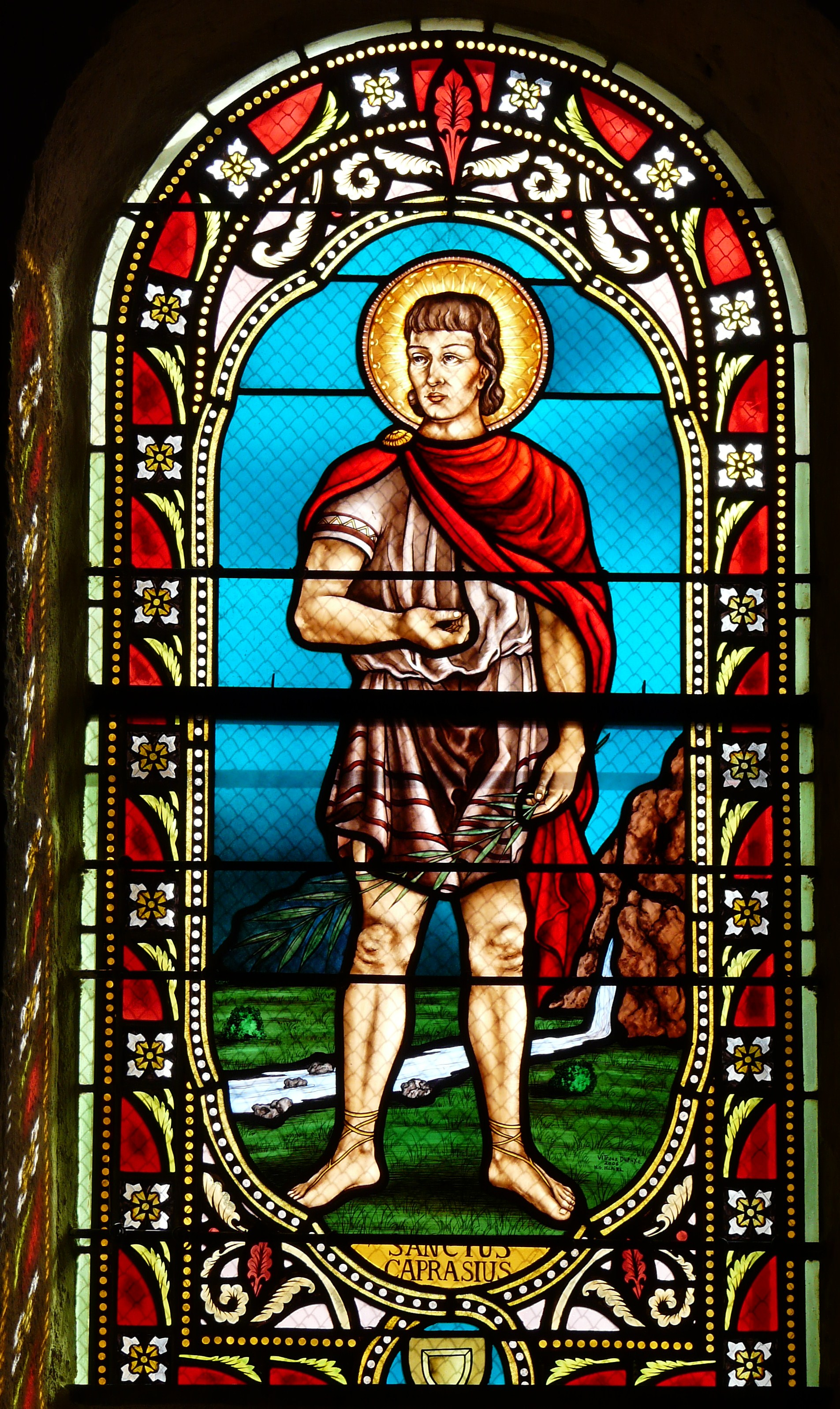 Vitrail représentant saint Caprais, église Saint-Capraise, Saint-Capraise-de-Lalinde, Dordogne, France.